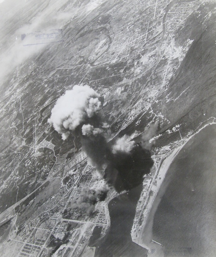 Bân-lâm-gú: Toshien bombardment 1945-04-30